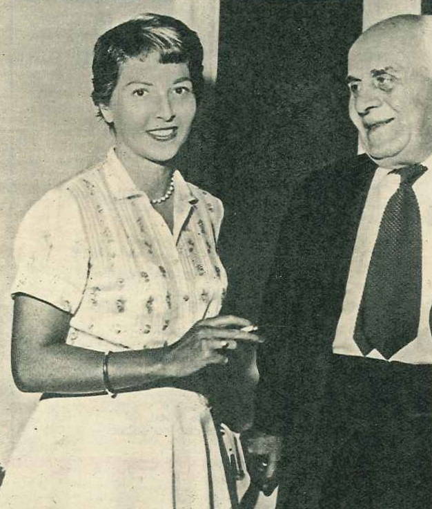 Carla Del Poggio con il padre Ugo Attanasio